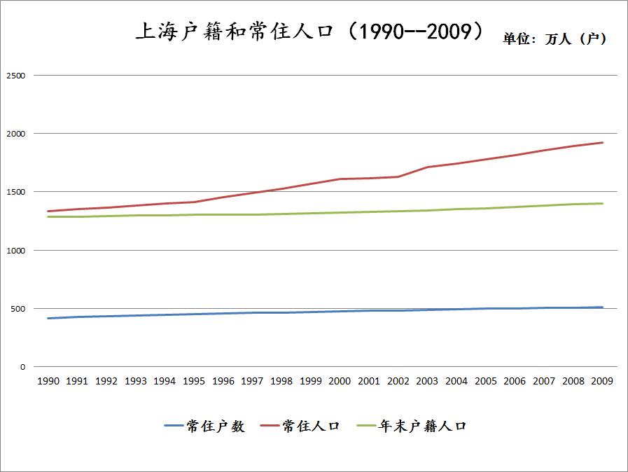 中文（中国大陆）: 根据上海市统计年鉴2010年制作，分为常住户口、常住居民数、户籍人口数